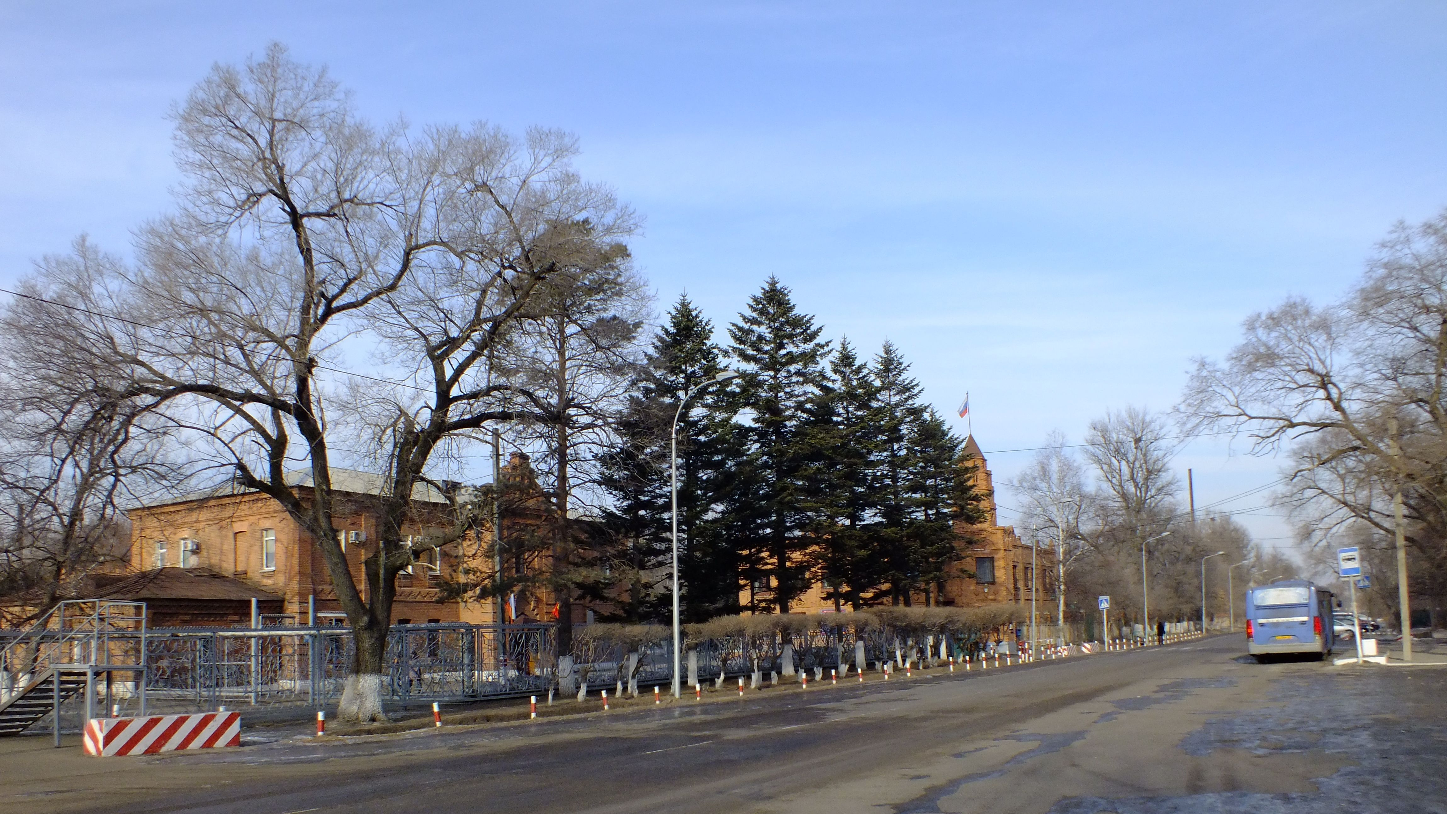 439 военный госпиталь МО РФ Уссурийск